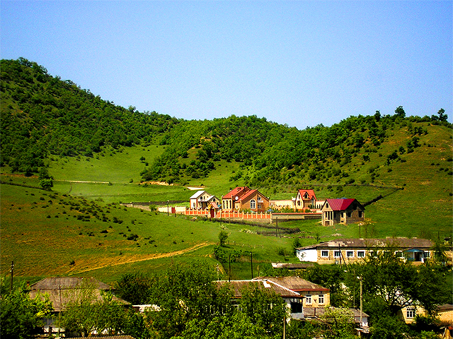 Барша